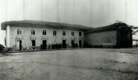 Foto da Fazenda Santana localizada atual bairro de Santana, São Paulo - Brasil